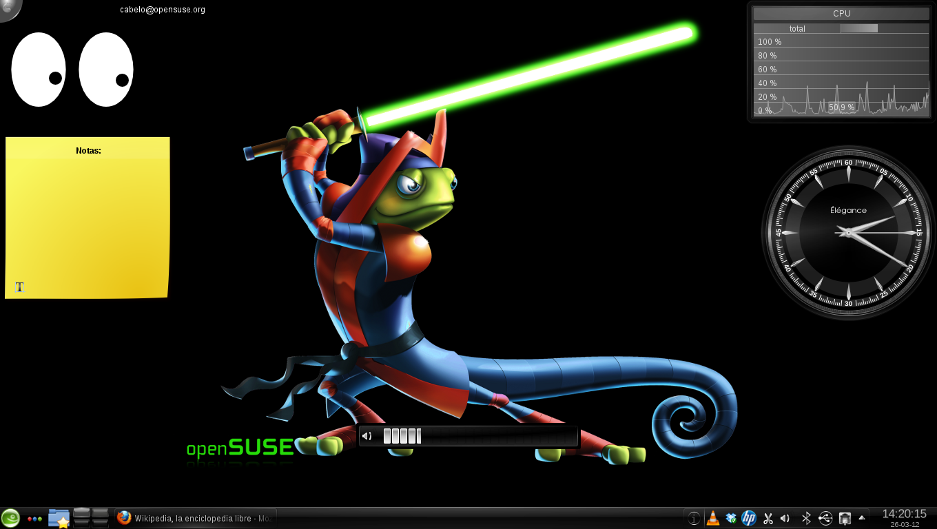 Captura de pantalla de OpenSuse 12.1 con entorno de escritorio KDE